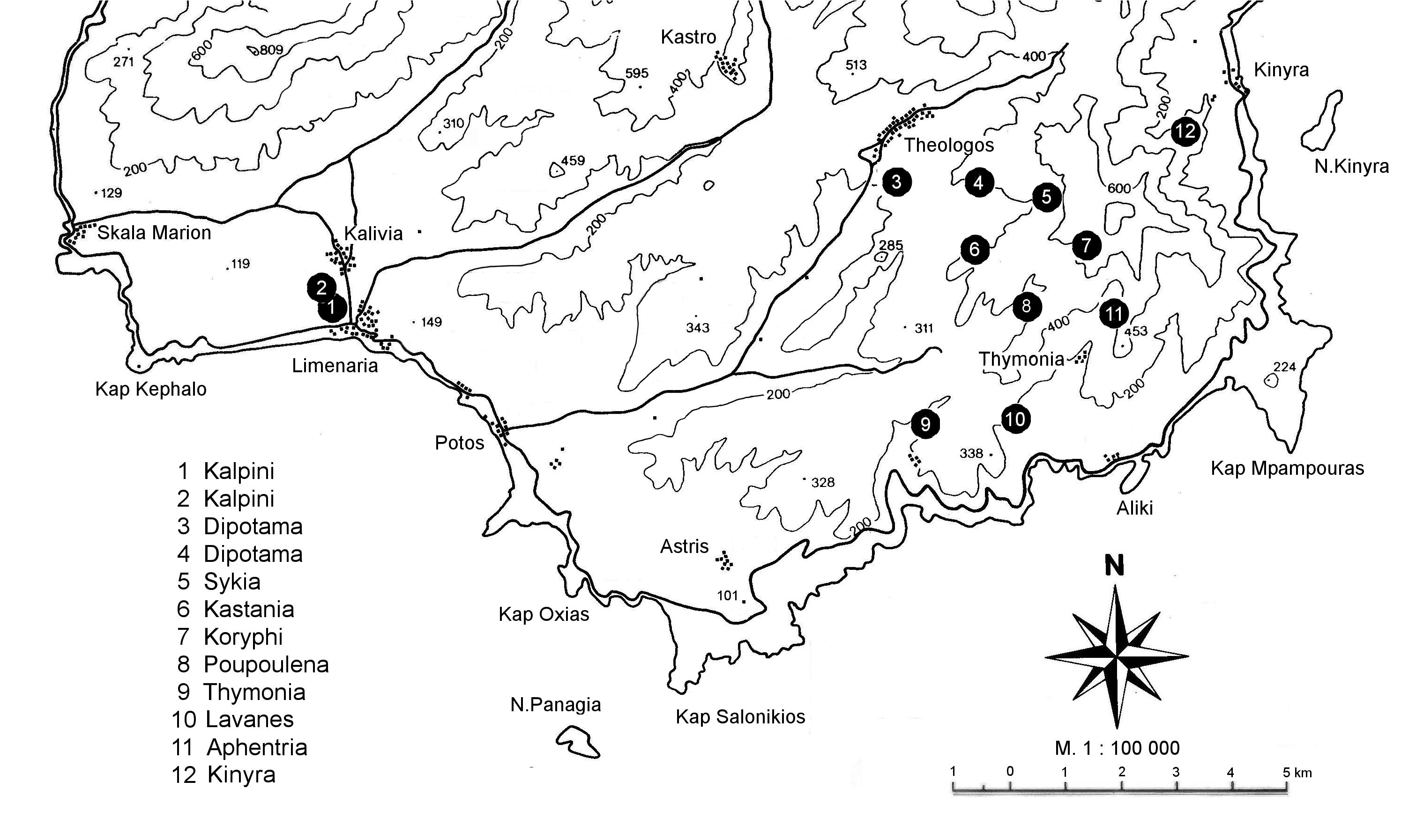 Standorte der Teeröfen im Süden der Insel Thasos (1912 – 1960)